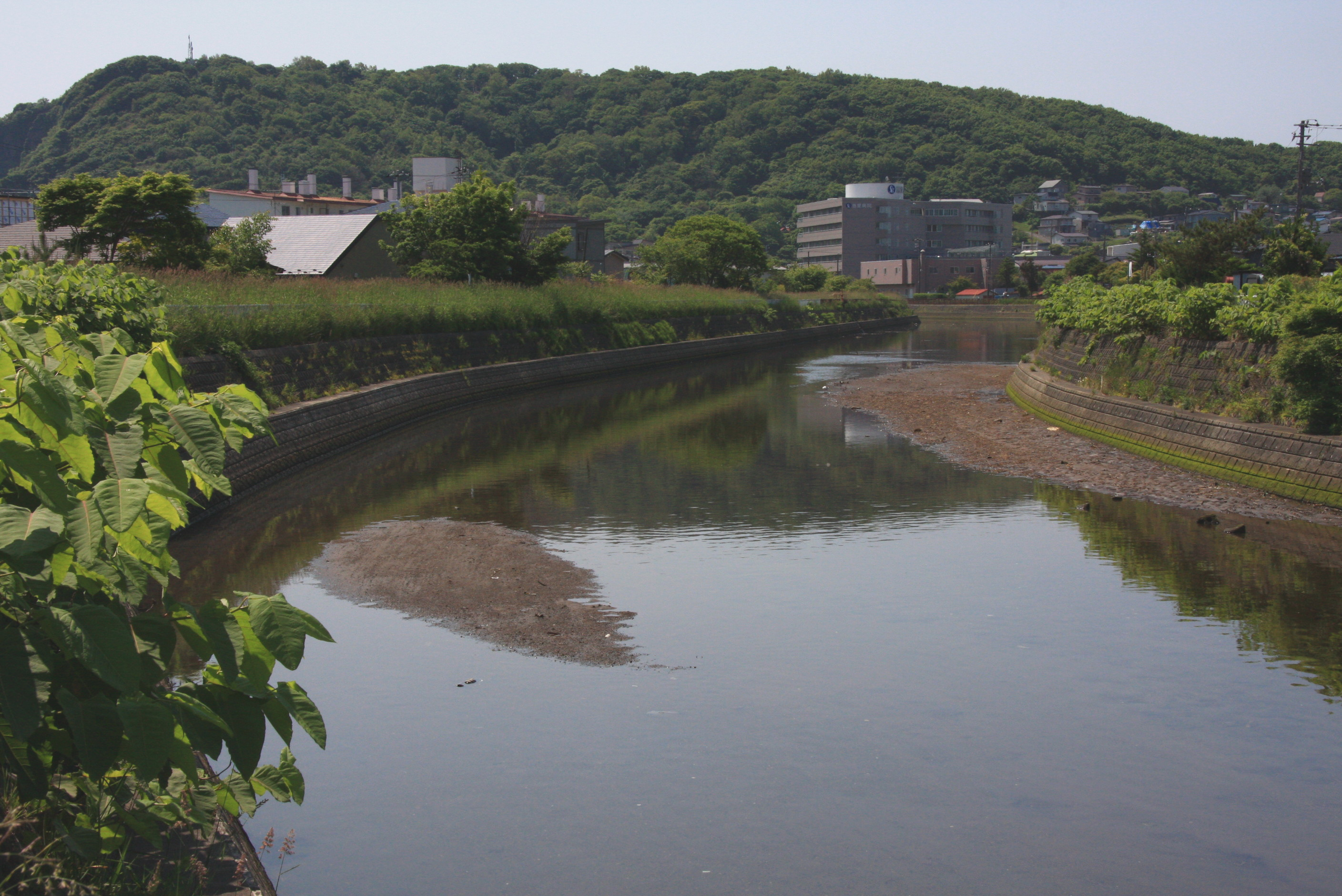 鷲別川（登別市） 新鷲別橋より下流を望む